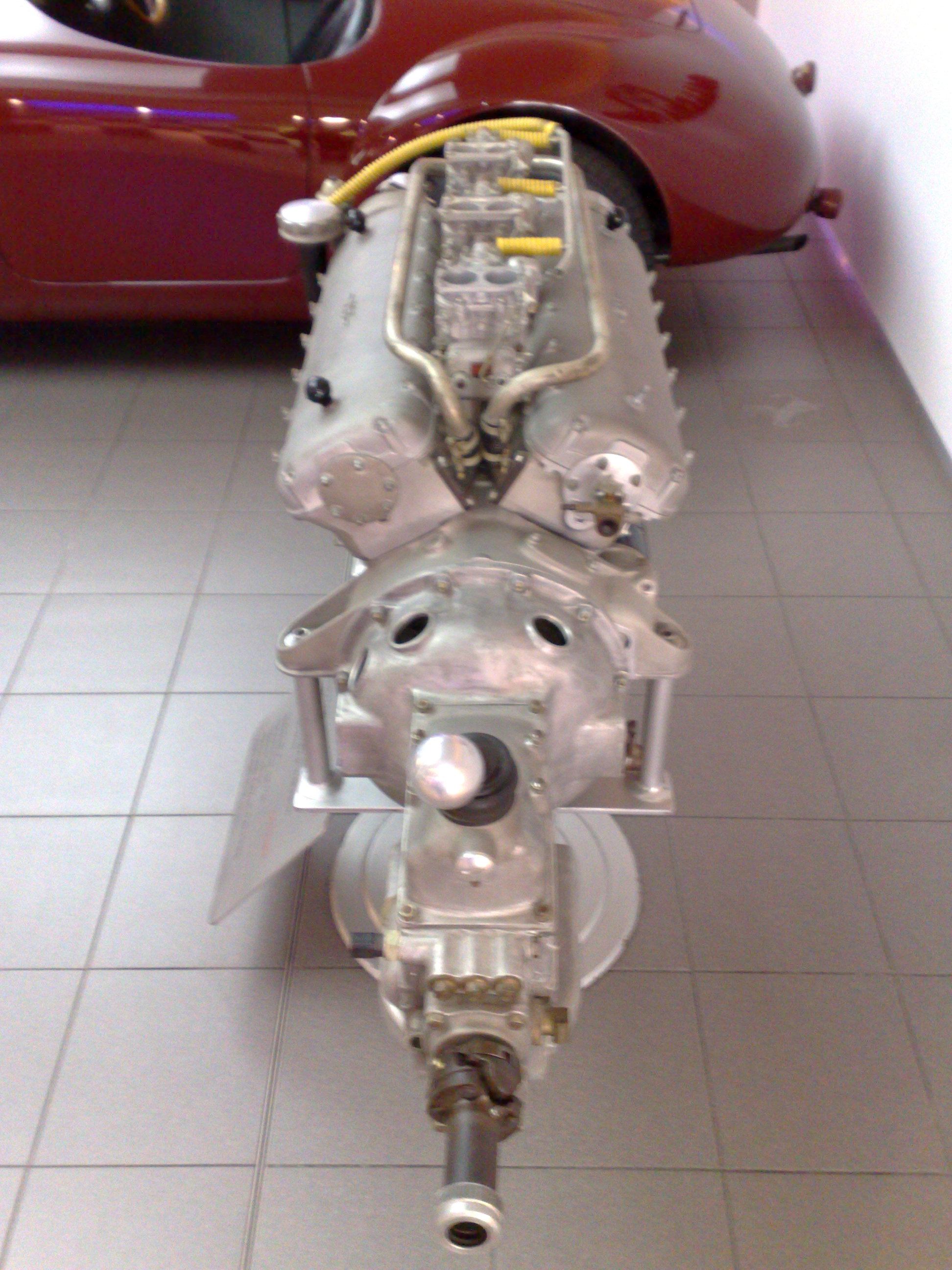 Motore di una Ferrai 125 S esposto alla Galleria Ferrari di Maranello